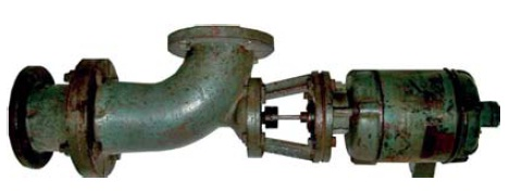 Pierwsza pompa obiegowa